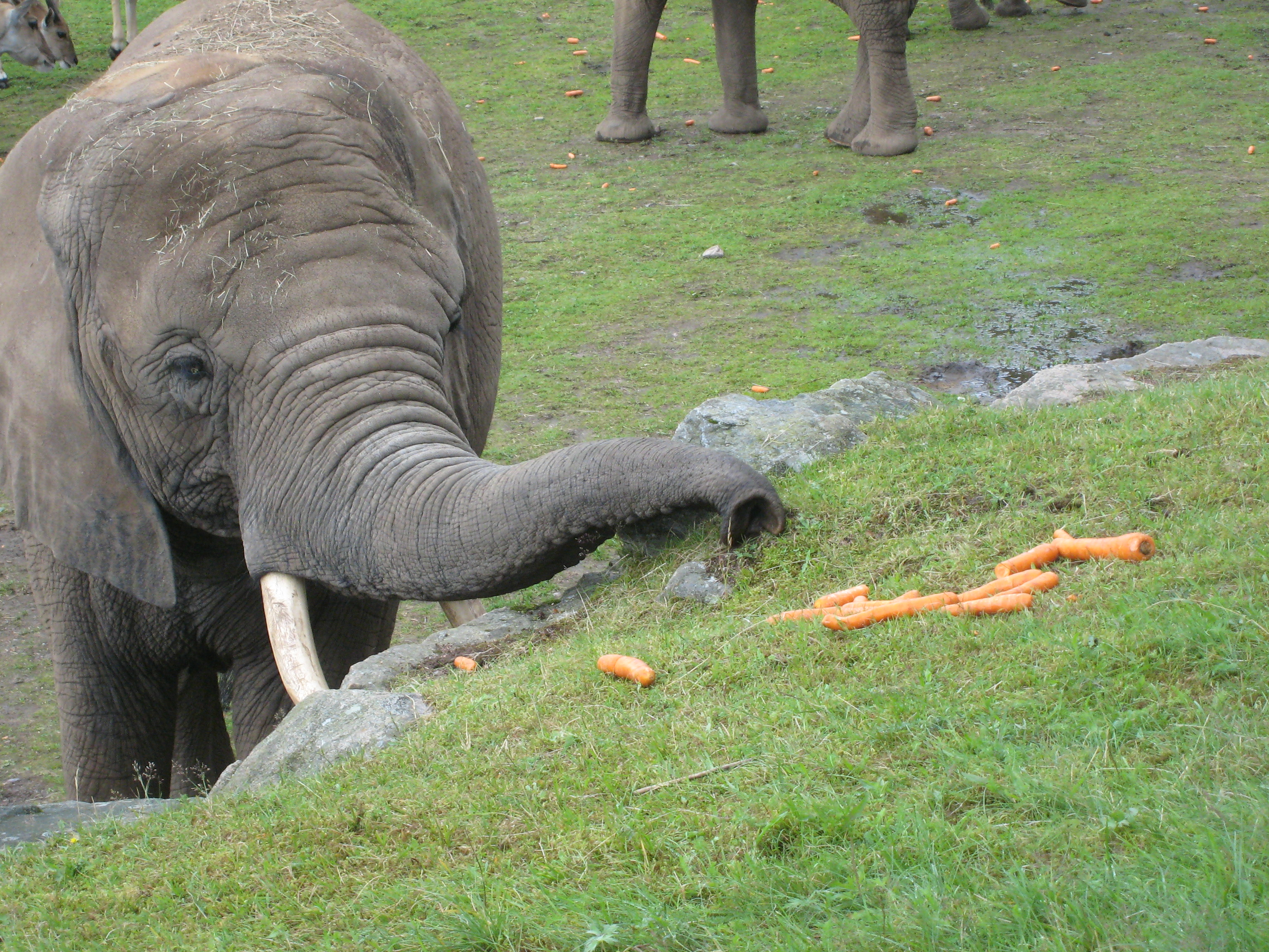 Elephant in Borås Djurpark